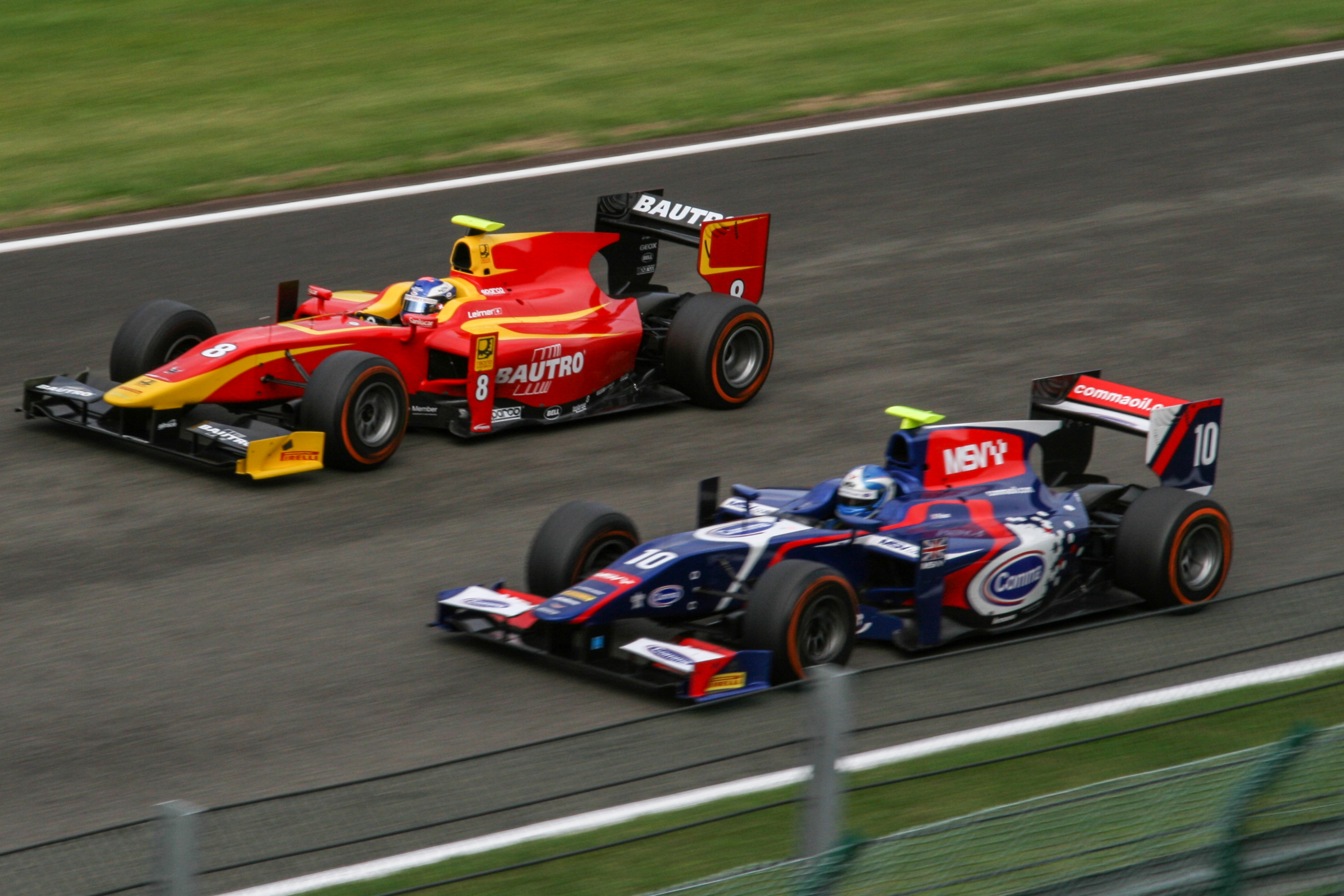 Fabio Leimer überholt Jolyon Palmer beim Sprintrennen der GP2-Serie in Spa-Francorchamps 2013